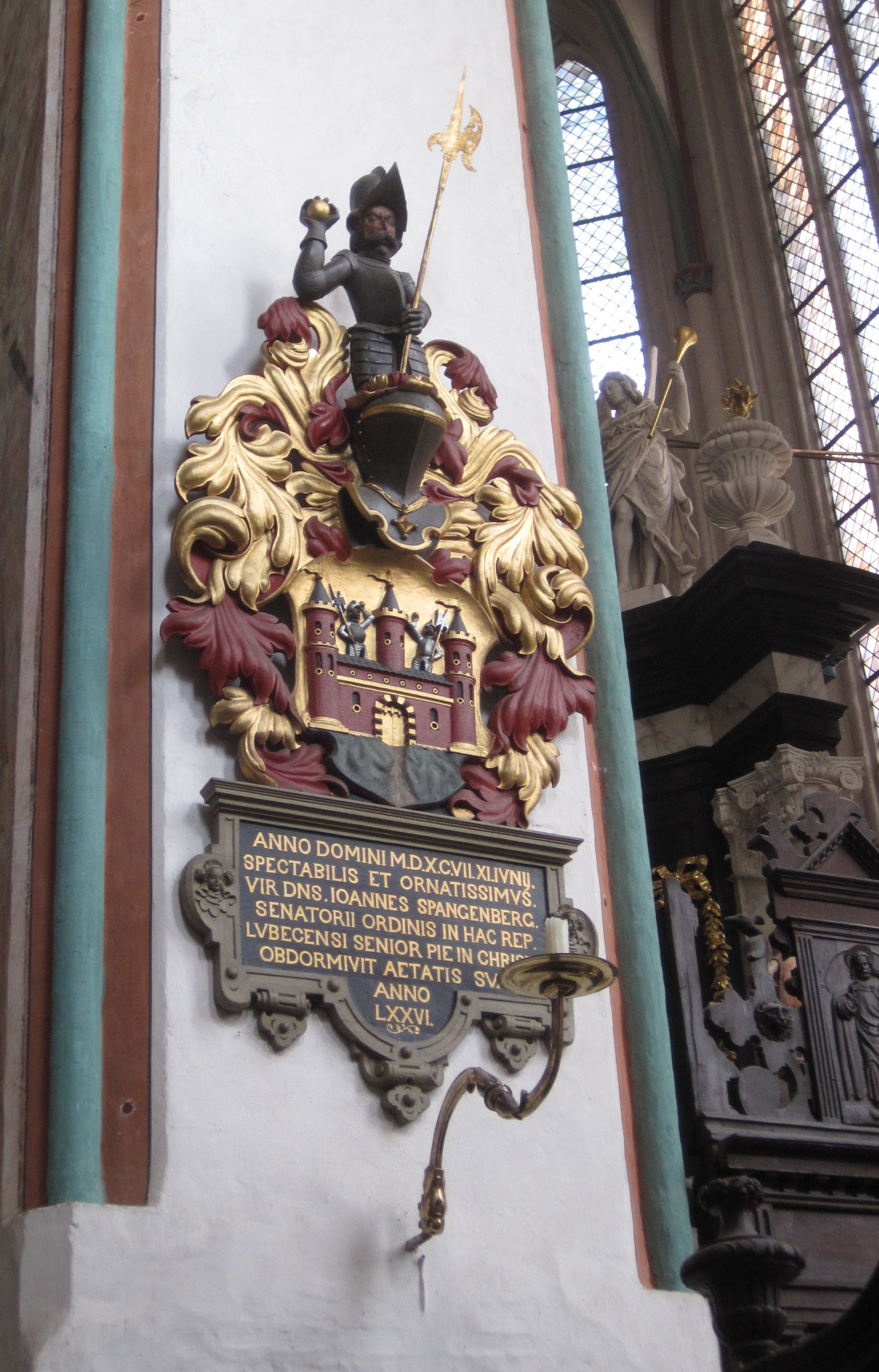 Wappenepitaph des Lübecker Ratsherrn Johann Spangenberg (+ 1597), Nr. 692 der Lübeckischen Ratslinie, in der Jakobikirche in Lübeck